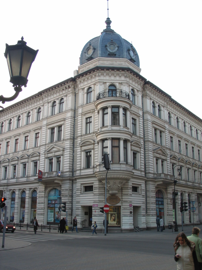 Kamienica Scheiblerów